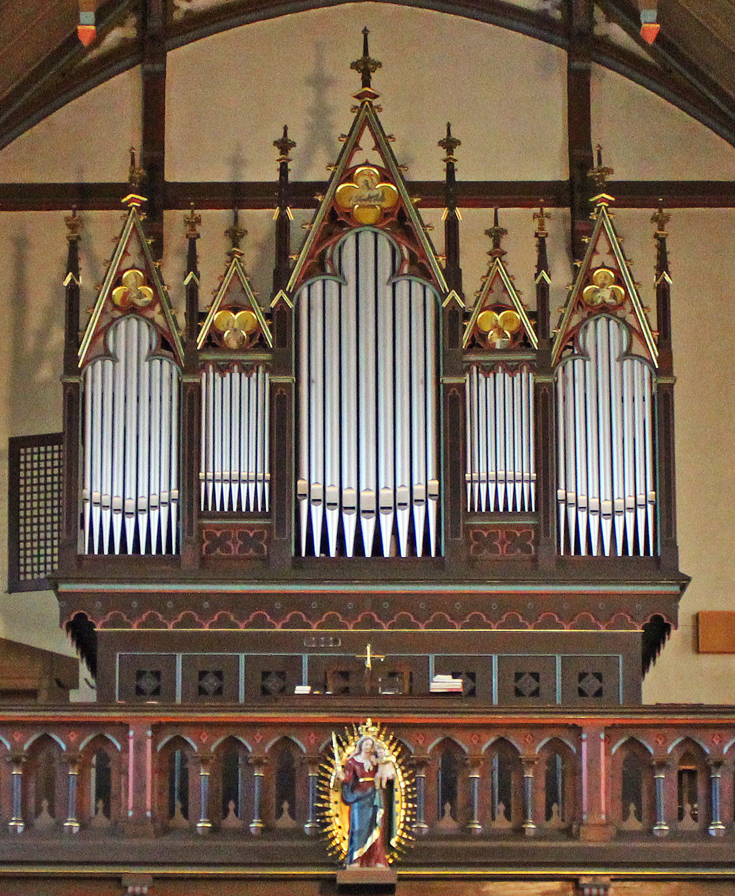 Blick ins Innere der katholischen Pfarrkirche St. Anna in Biesingen, einem Stadtteil von Blieskastel, Saarland